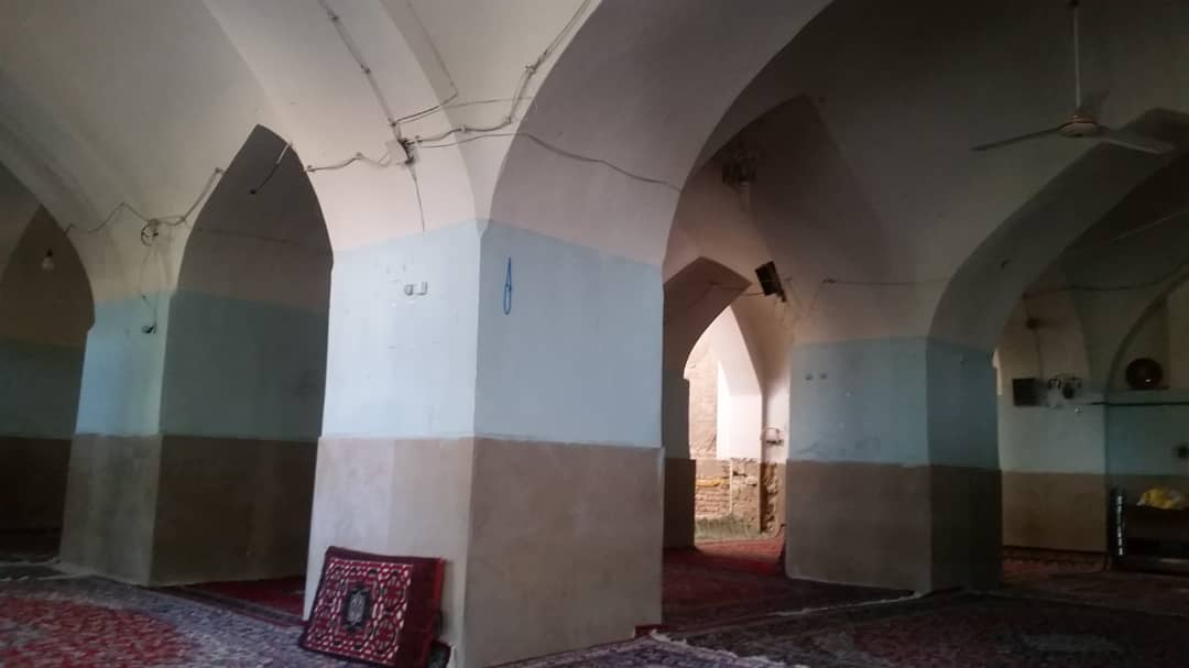 بناهای کوشک قاضی